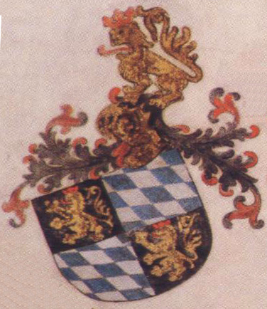 Wappen Kurfürst Ludwig III. von der Pfalz, Gemälde im Chor der Stiftskirche Neustadt an der Weinstrasse